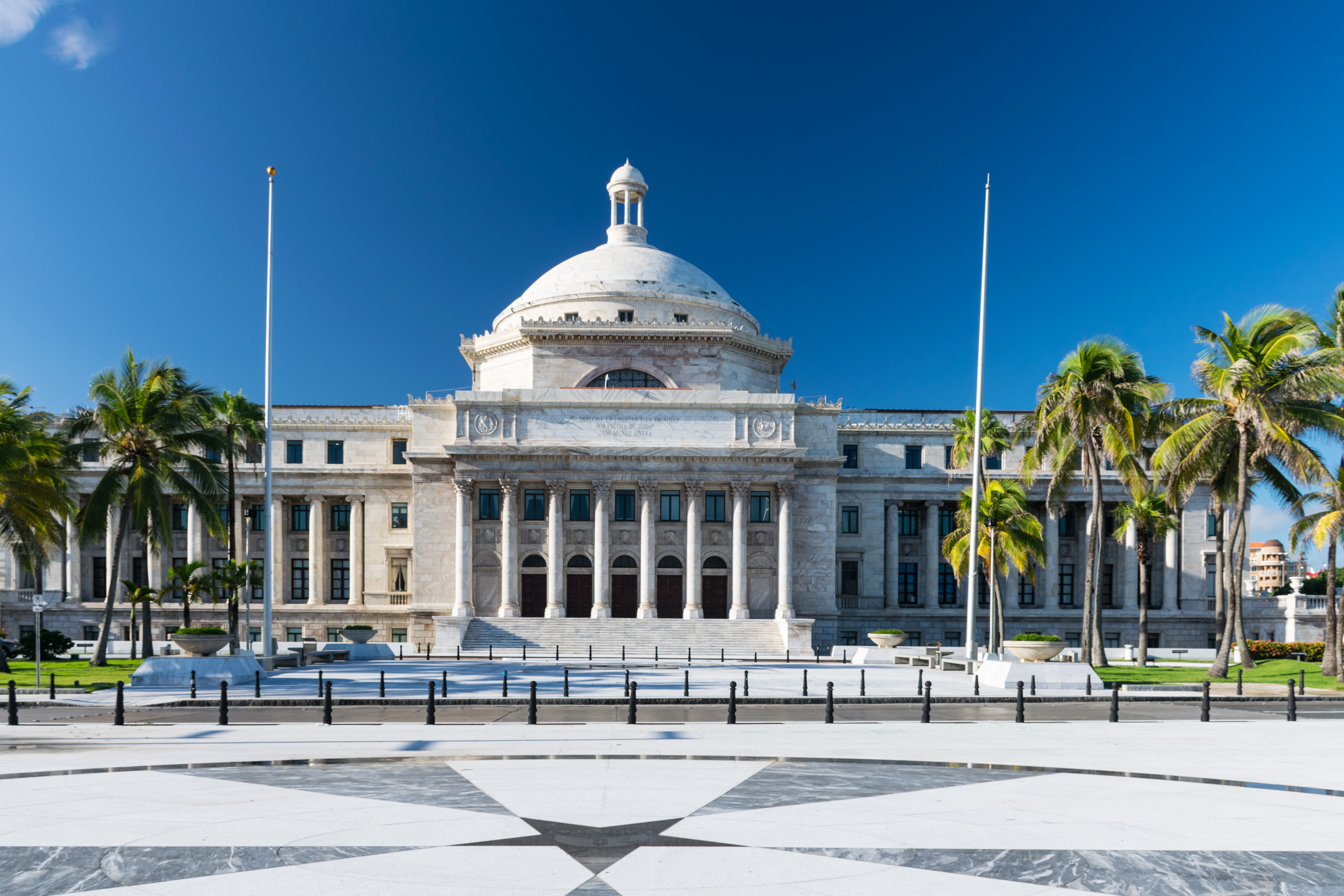 El Capitolio de Puerto Rico